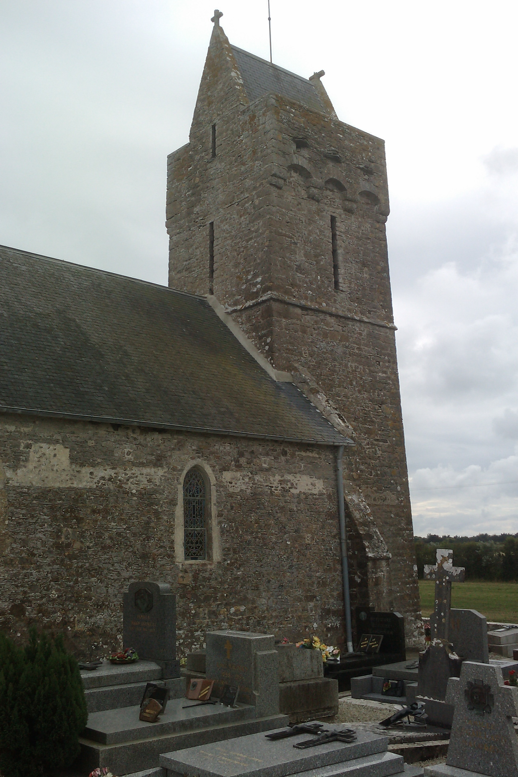 Église de Surville